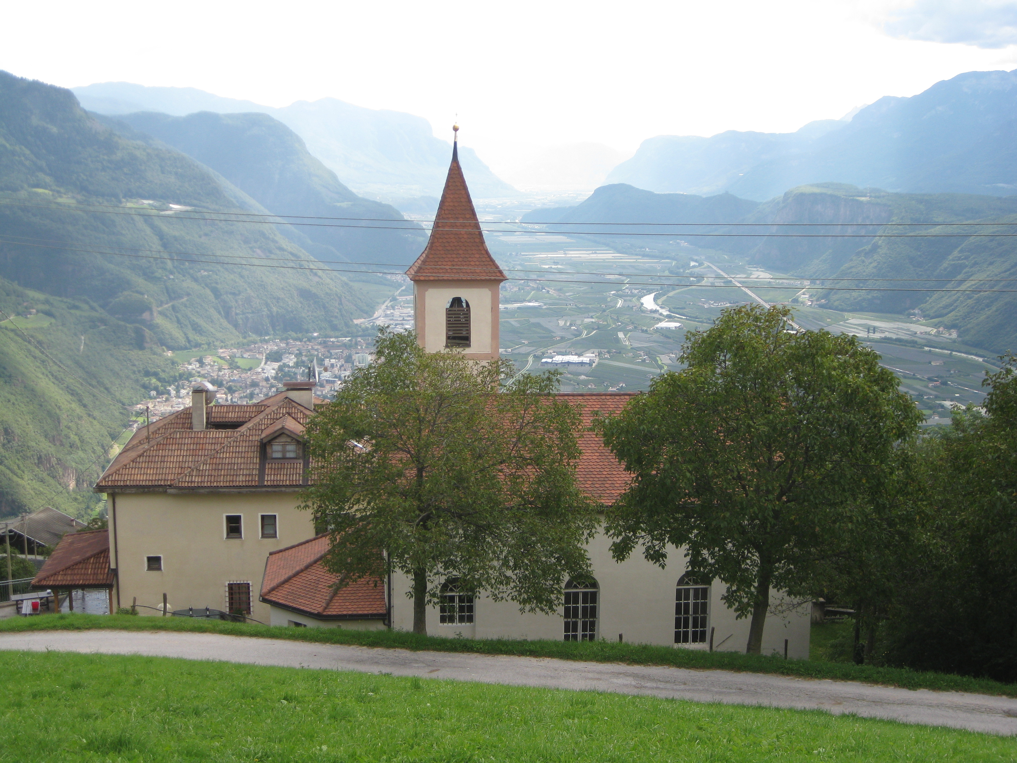 Pfarrkirche zum Seligen Heinrich von Bozen in Seit, Gemeinde Leifers, Südtirol